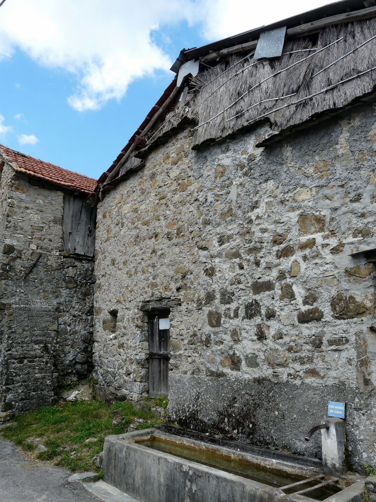 Casa del centro storico, Fascia, Liguria, Italia